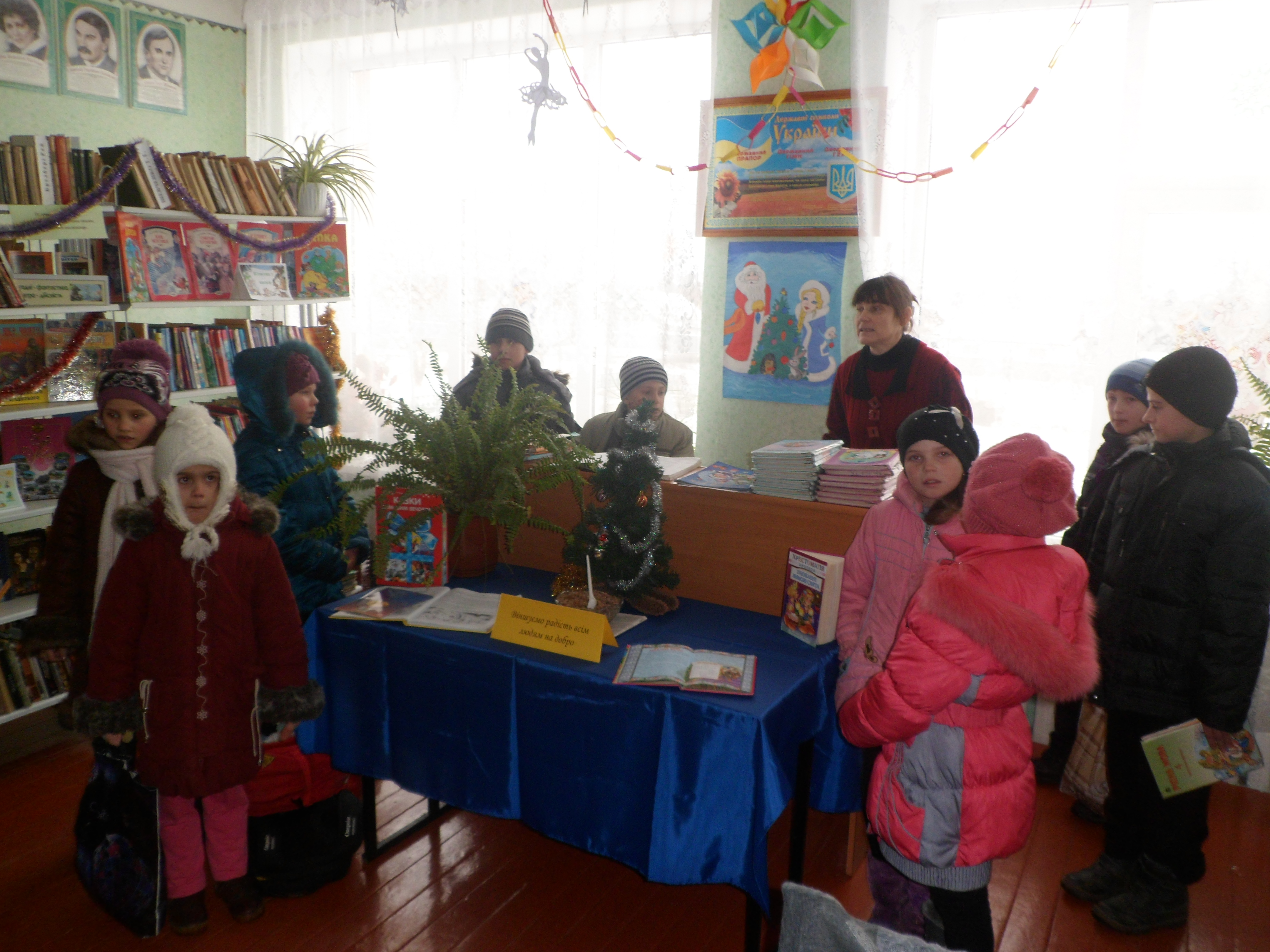 Захід у бібліотеці